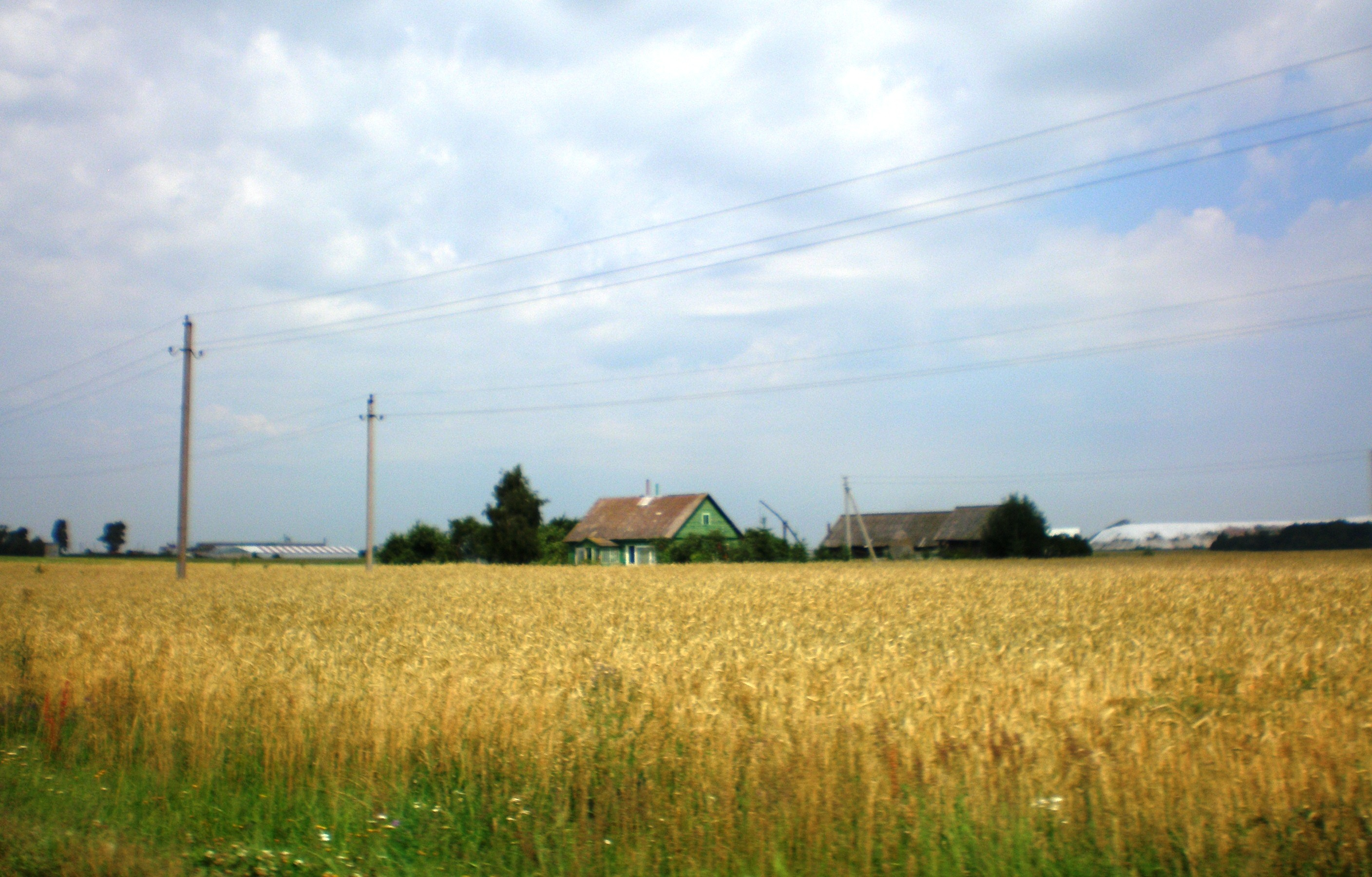 Kudžioniai, Kėdainių raj.